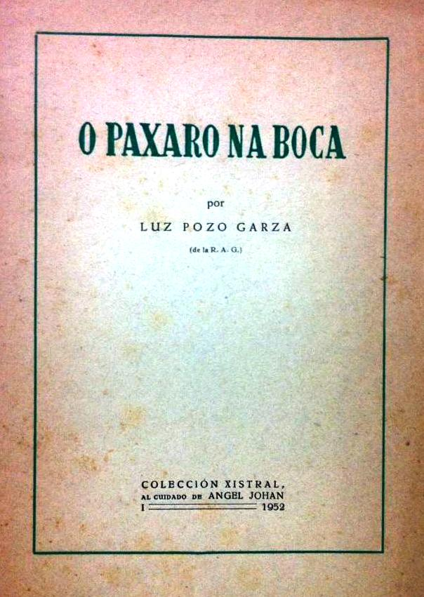 O paxaro na boca por Luz Pozo Garza, Colección Xistral, 1952